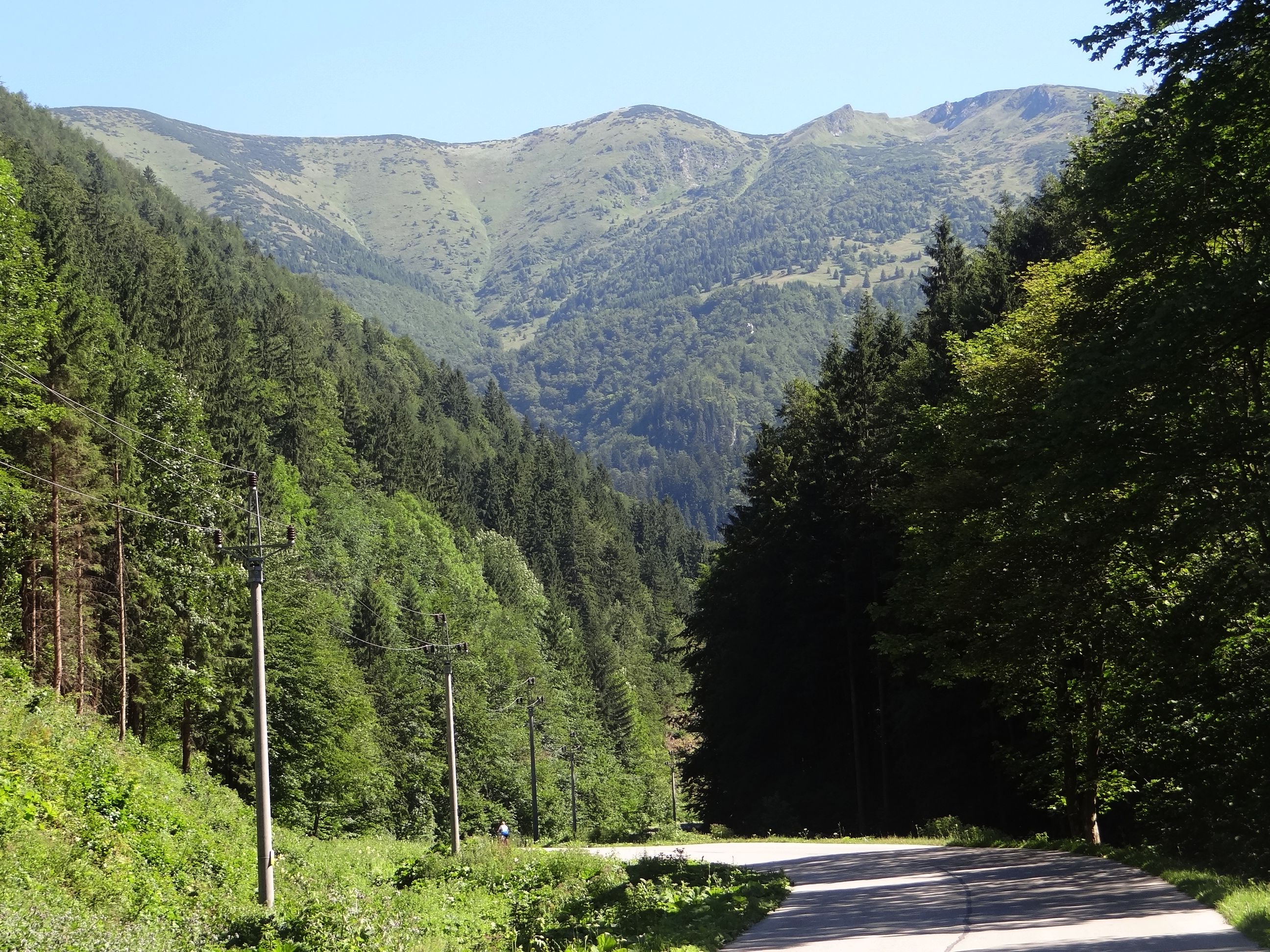 Vrátna dolina